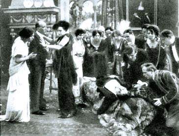 Sperduti nel buio (Martoglio, 1914). La morte del duca - foto scena